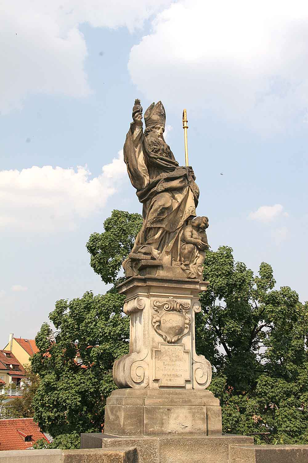 Česky: Sousoší Svatého Augustina na Karlově mostě, Praha-Malá Strana, ostrov Kampa.